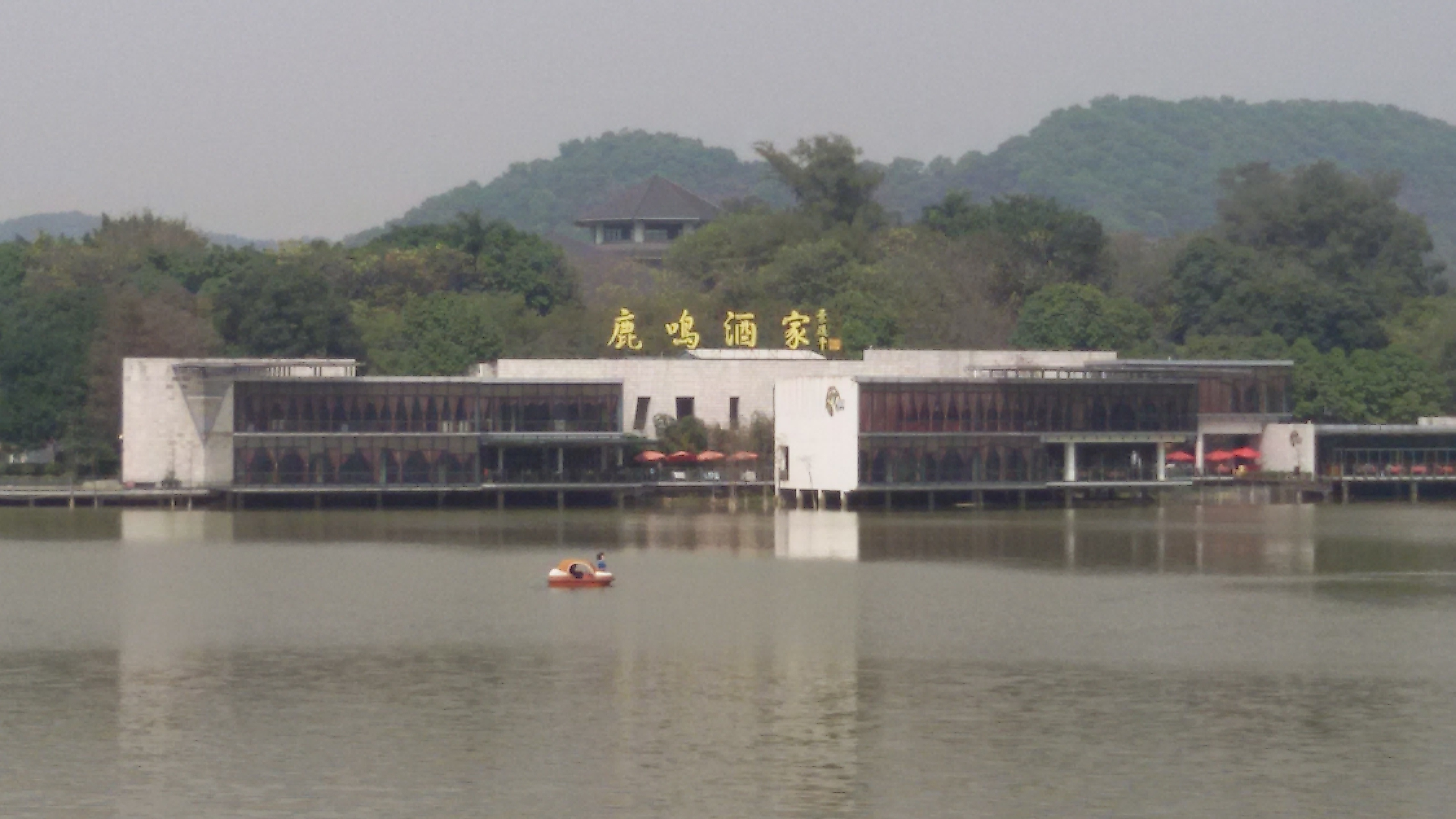 粵語: 鹿鸣酒家